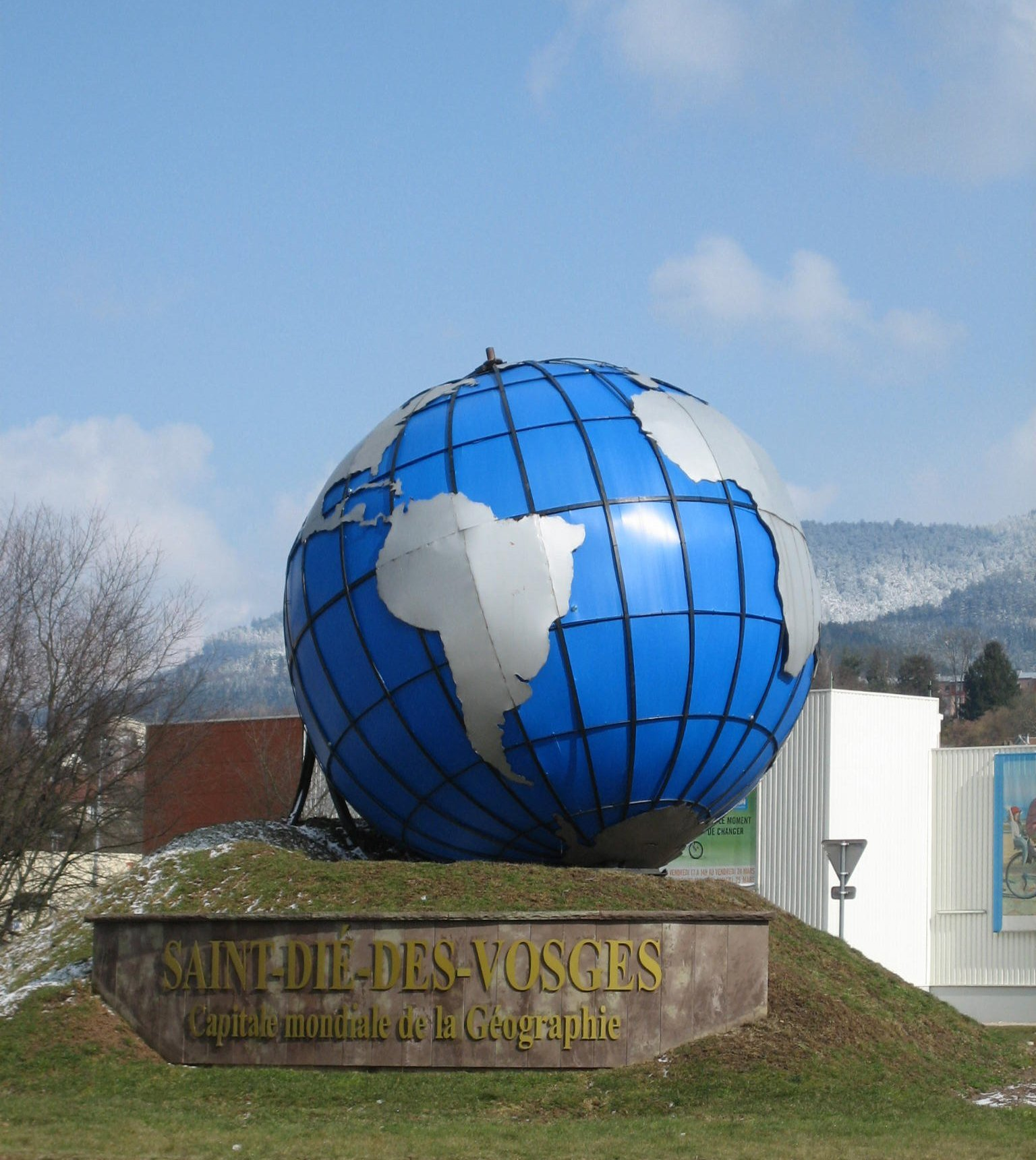 {fr} Saint-Dié-des-Vosges, capitale mondiale de la géographie (88100) France